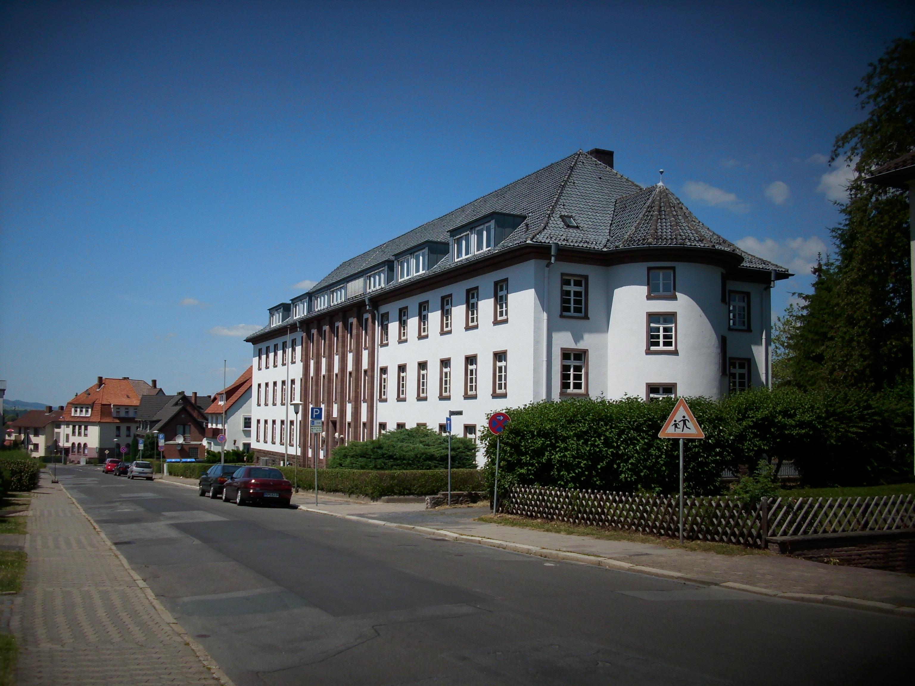 Das im Stile des Neoklassizismus erbaute Finanzamt.